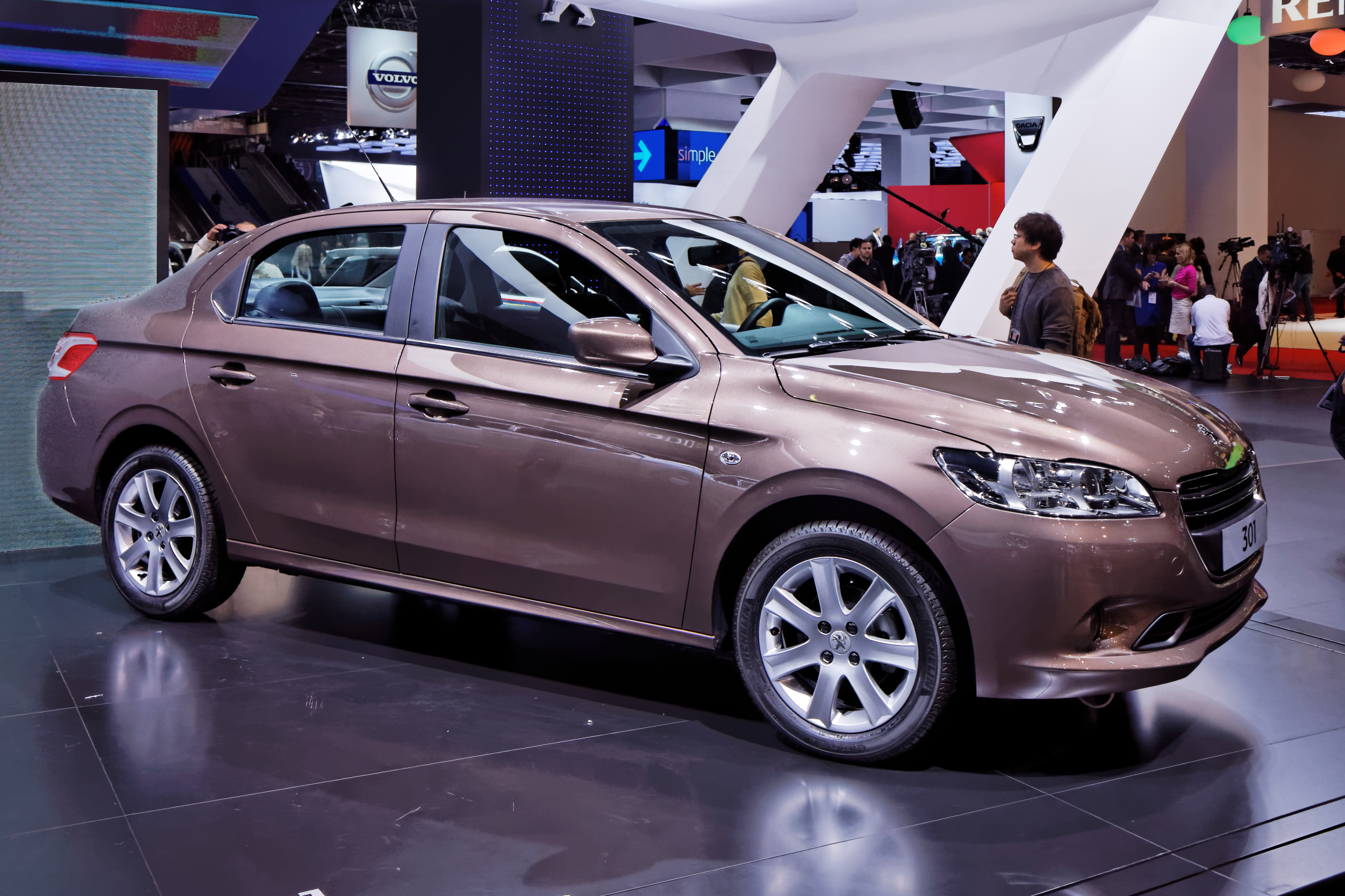 Une Peugeot 301 présentée lors du Mondial de l'Automobile de Paris 2012.